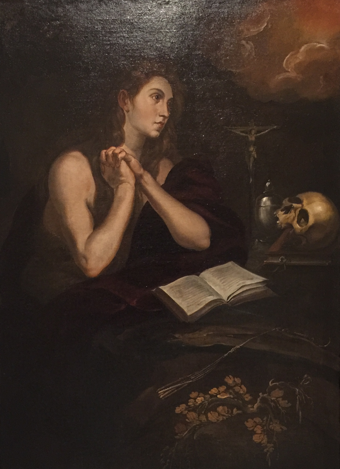 Le peintre invite le spectateur à se repentir et à faire pénitence.